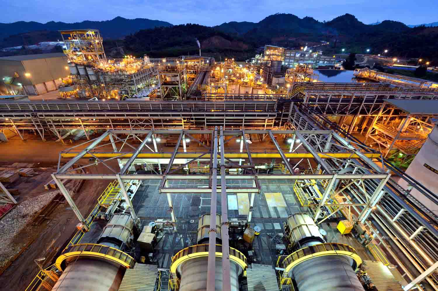 Công ty TNHH Một thành viên Tài nguyên Masan Thái Nguyên (MRTN) đang khai thác tại mỏ Núi Pháo, một trong những mỏ vonfram lớn nhất thế giới với trữ lượng quặng tiềm năng đã được chứng minh là 66 triệu tấn